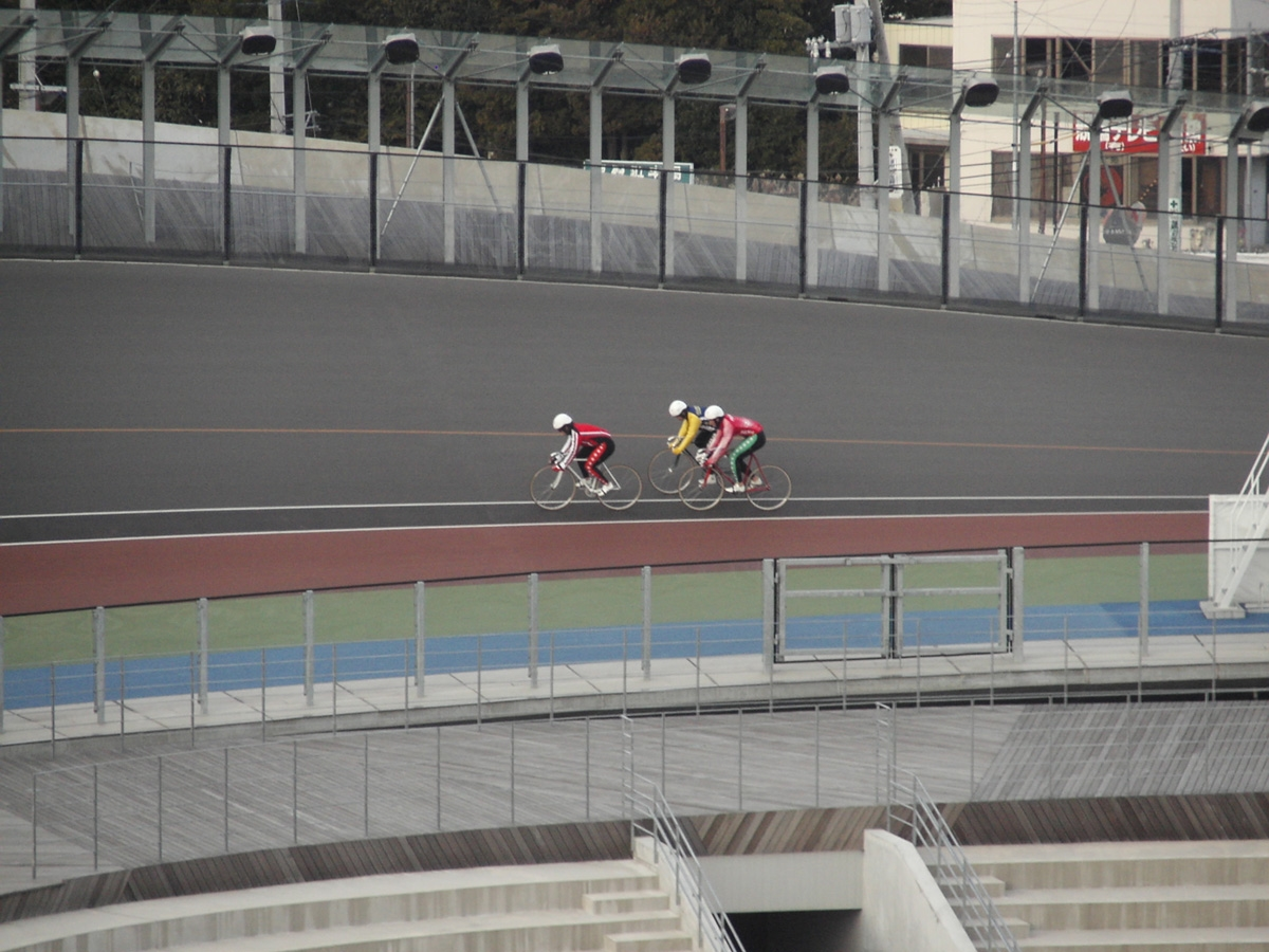 IwakiCity iwaki Tairakeirin いわき市 いわき平競輪場内のバンクでトレーニング中の競輪選手。